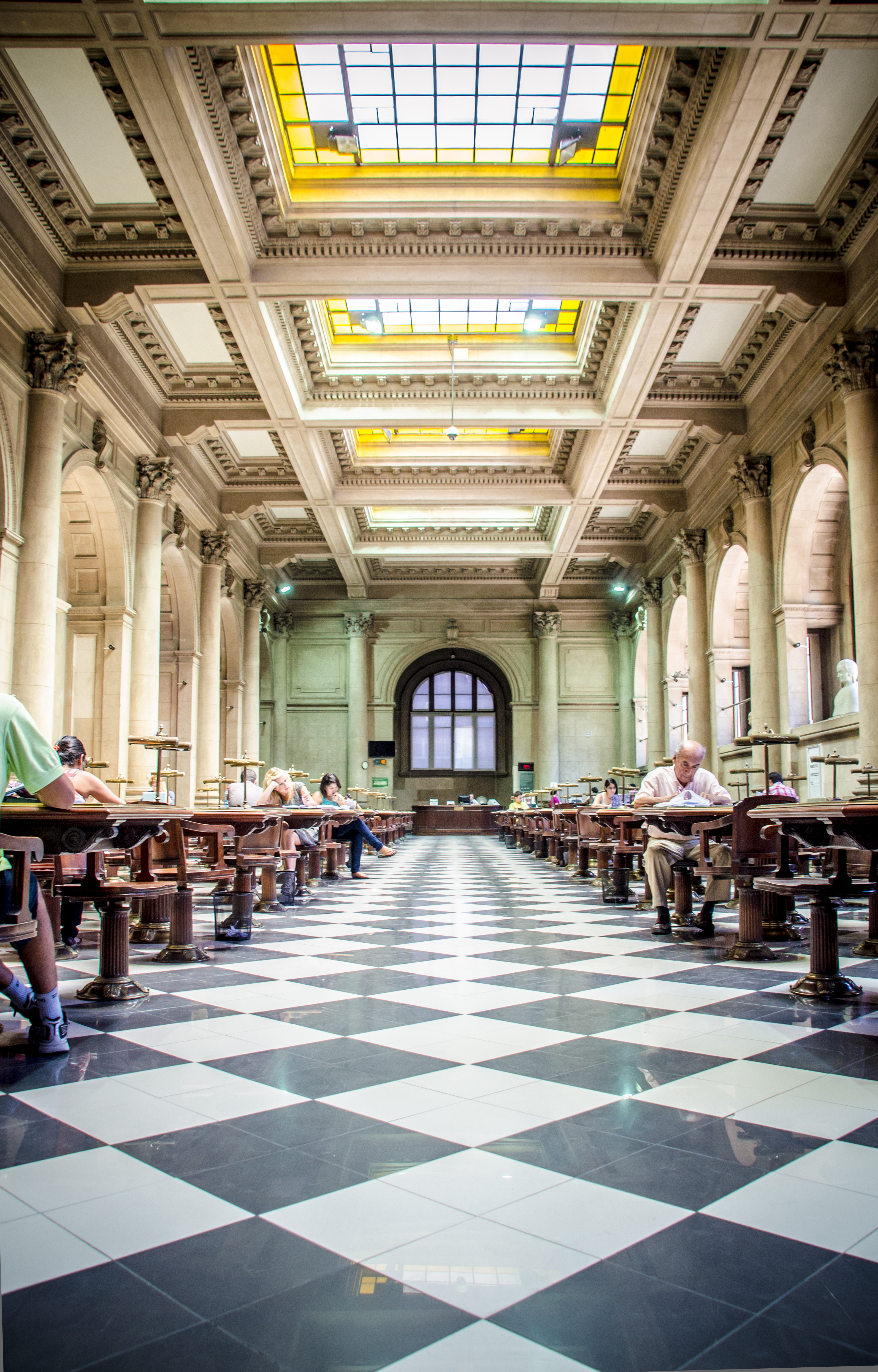 Biblioteca Nacional de Chile This is a photo of a national monument in Chile: 102